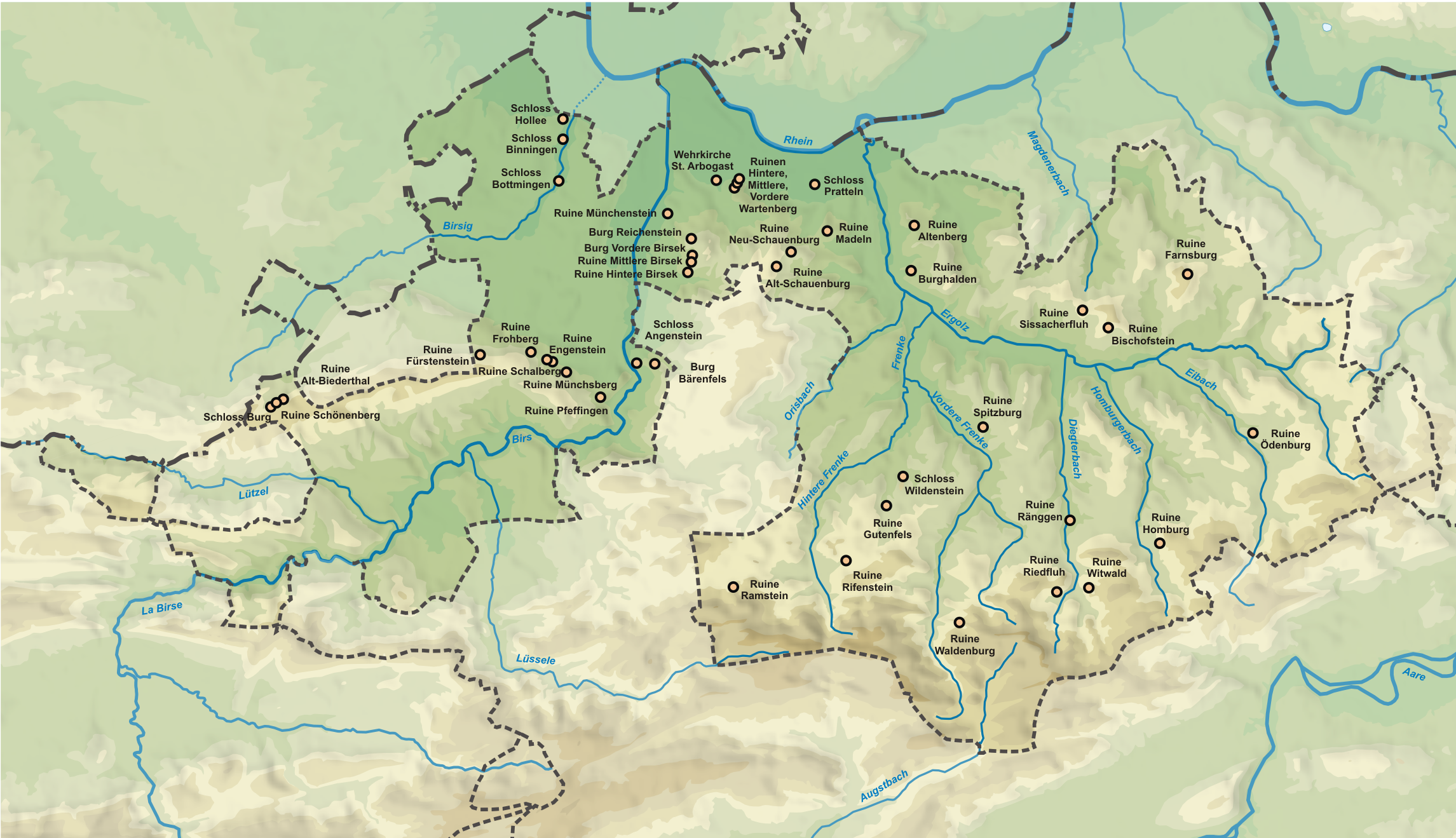 Karte der Burgen und Schlösser des Kanton Basel-Landschaft. Topographischer Hintergrund: NASA Shuttle Radar Topography Mission (public domain). SRTM3 v.2.